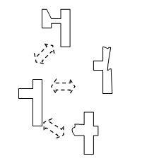 Un schema di como funziona la rete di Hopfield. La imagine delle centro deve essere trova sempre che quest è leggermente distorta (per esempio rumore bianco).